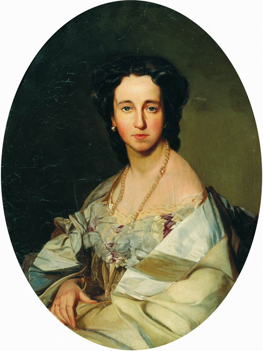 Портрет Надежды Фёдоровны Самсоновой, урождённой Львовой